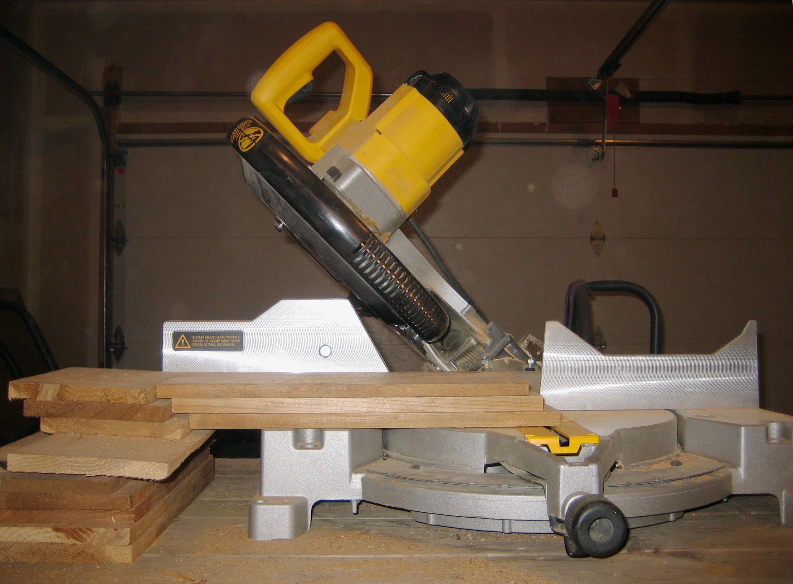 Electric miter saw